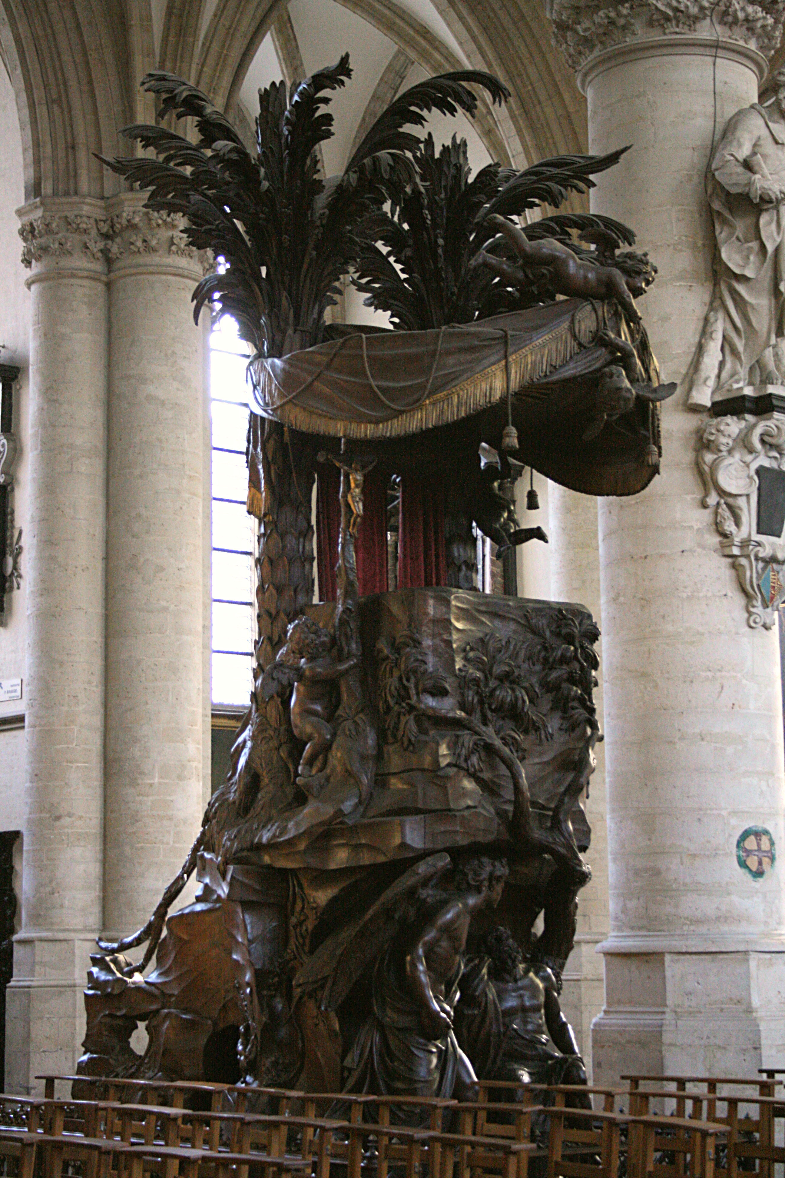 Notre-Dame de la Chapelle, Place de la Chapelle, Bruxelles (Belgique). Chaire baroque